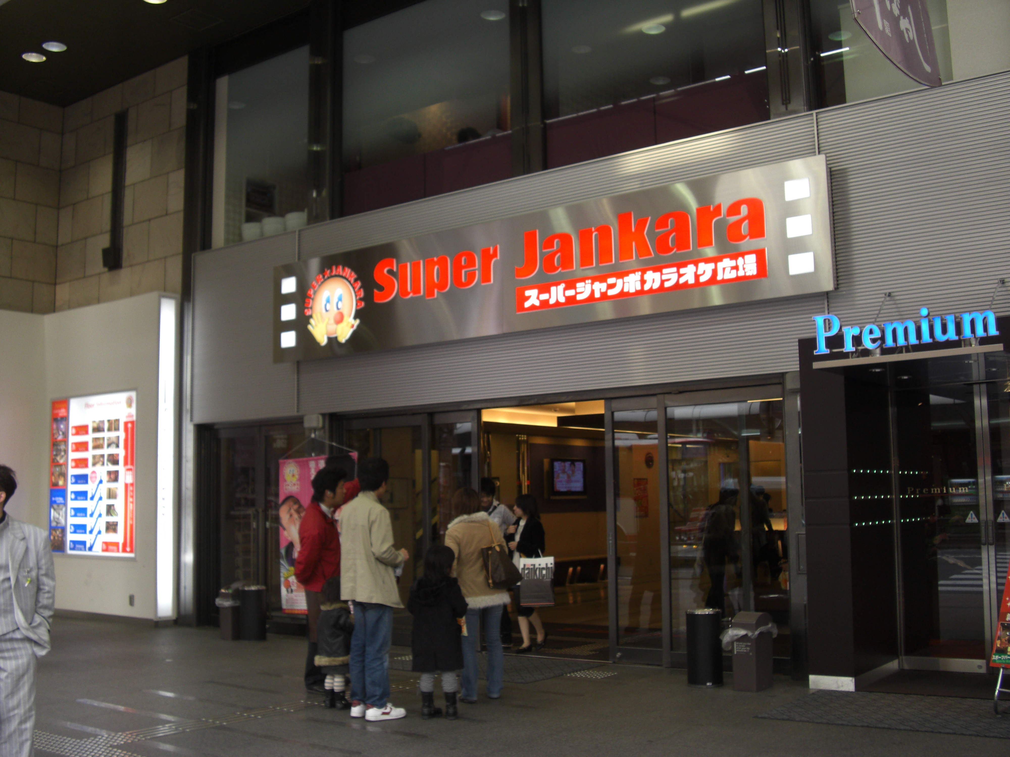 Super Jankara Kawaramachi,Nakagyo-ku Kyoto-City Kyoto Japan.